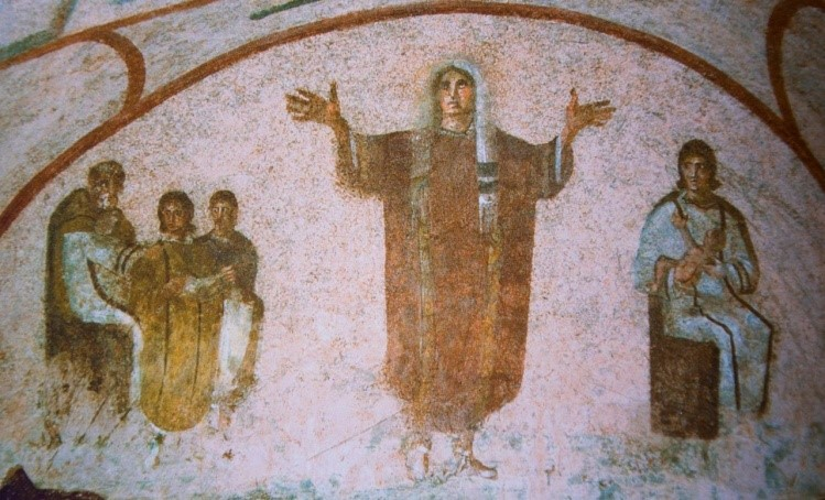 Orantas poza, ., Priscillas katakombas, Roma.